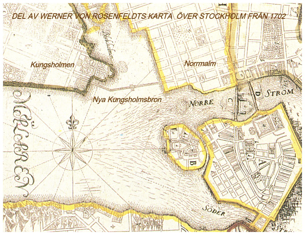 Werner von Rosenfeldts karta över Stockholm från 1702, utsnitt, kompl. med förklarande text av Holger Ellgaard